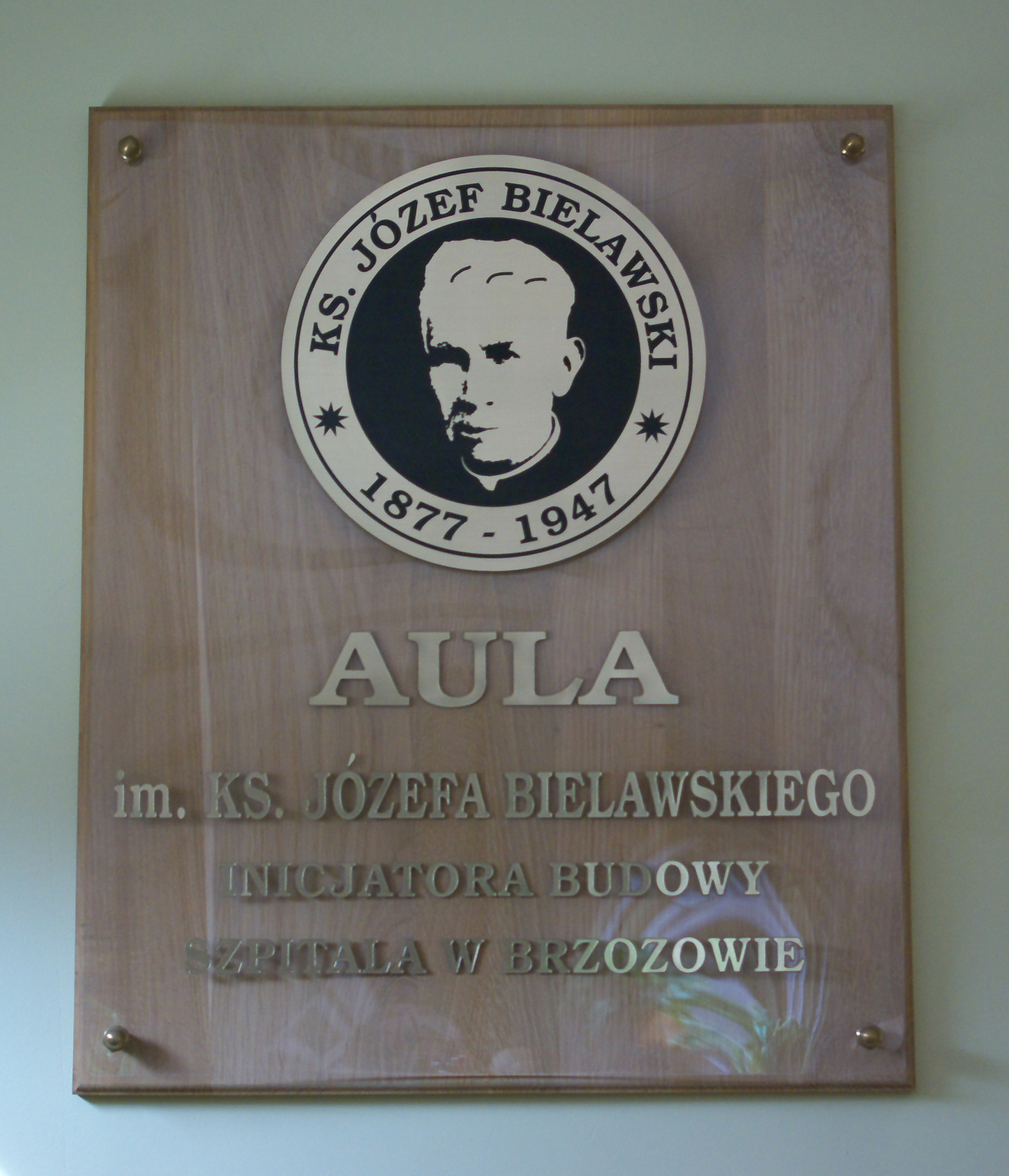 Aula im. ks. Józefa Bielawskiego w Szpitalu Specjalistycznym w Brzozowie. Tablica pamiątkowa patrona, ks. Józefa Bielawskiego.